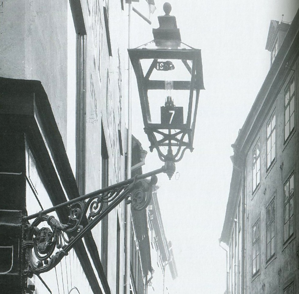 Gaslykta på Västerlånggatan i Gamla Stan, Stockholm